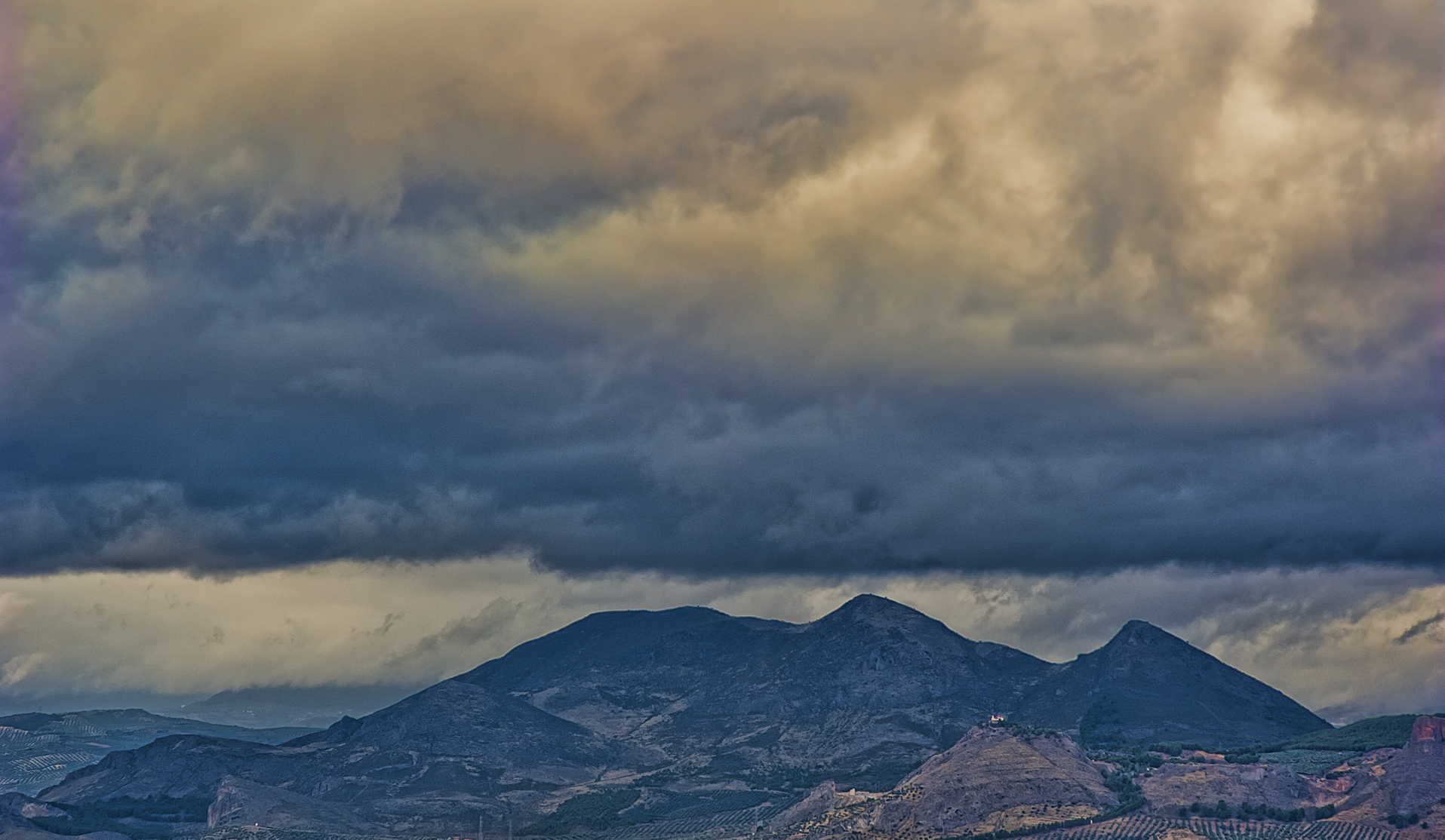 Sierra Elvira, en la provincia de Granada (España)